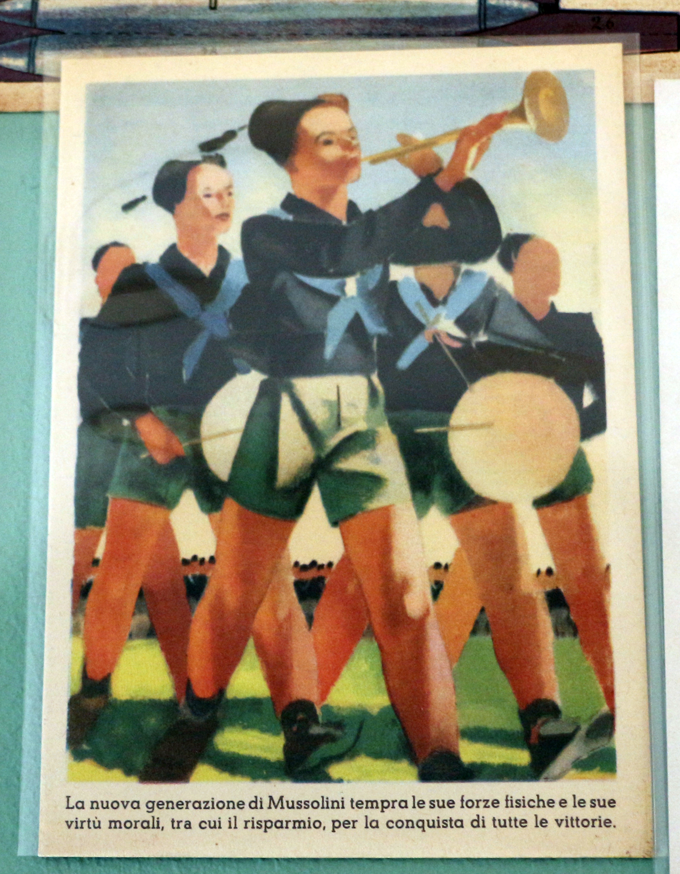 Il parco e i musei di Nervi This is a photo of a monument which is part of cultural heritage of Italy.